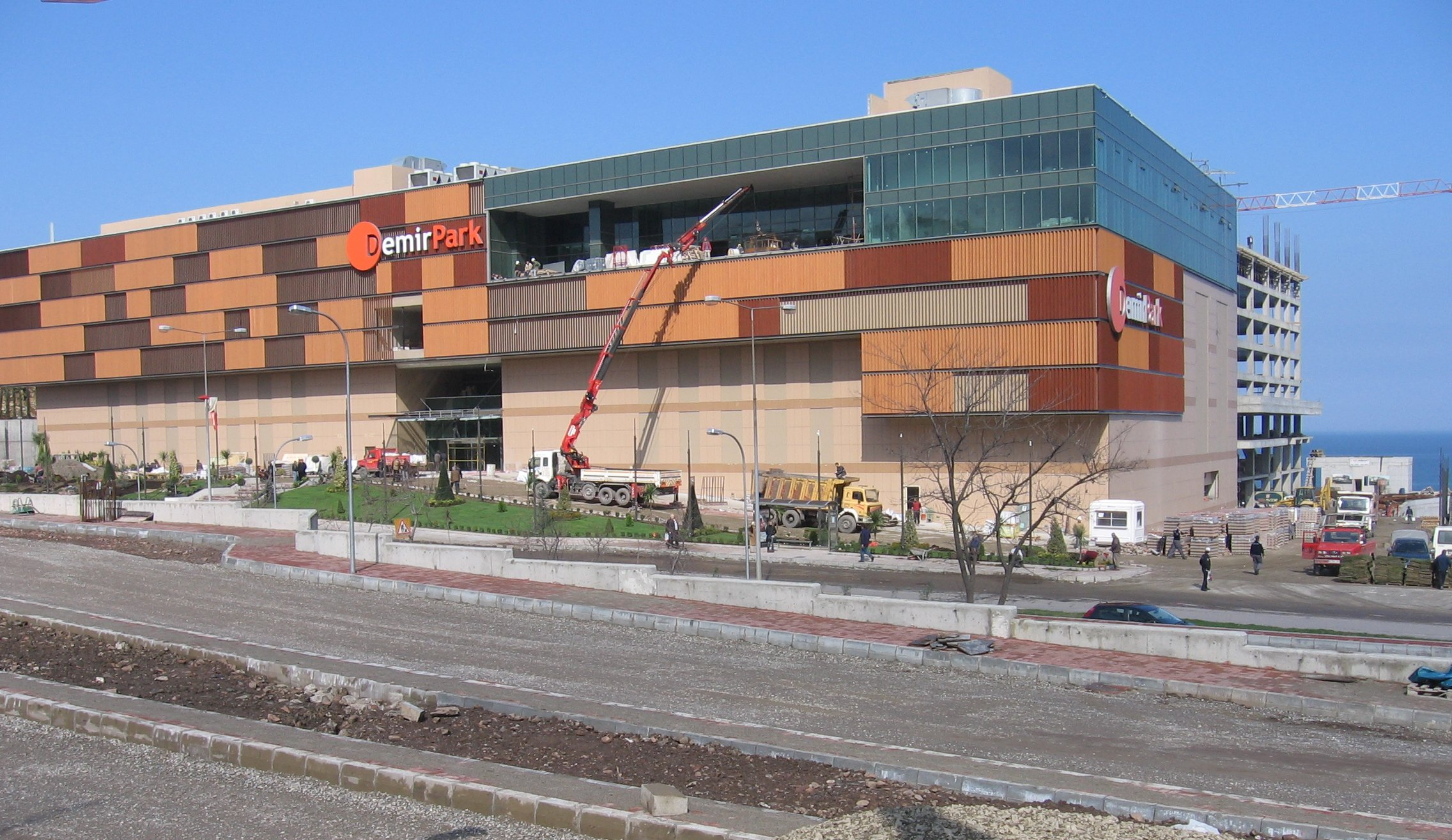 Demirer Parkı İnşaatı